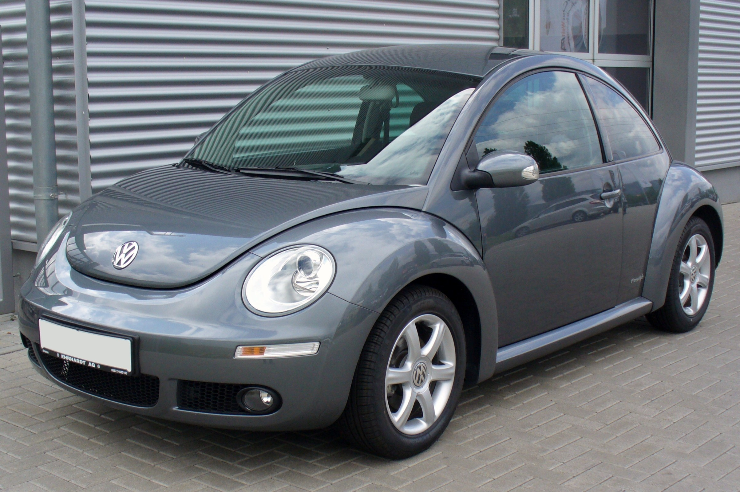 VW New Beetle